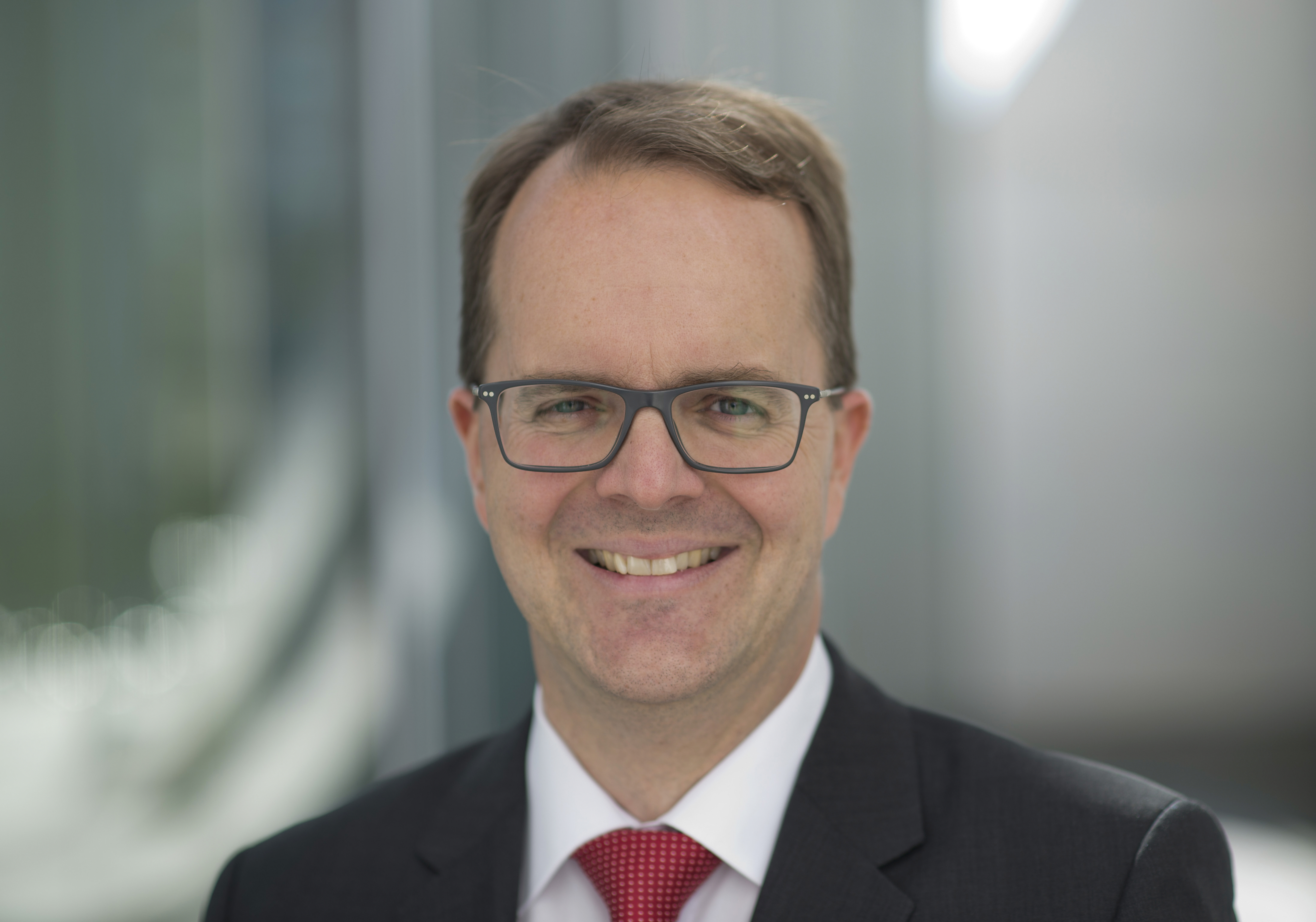 BayernSPD-Fraktionsvorsitzender Markus Rinderspacher